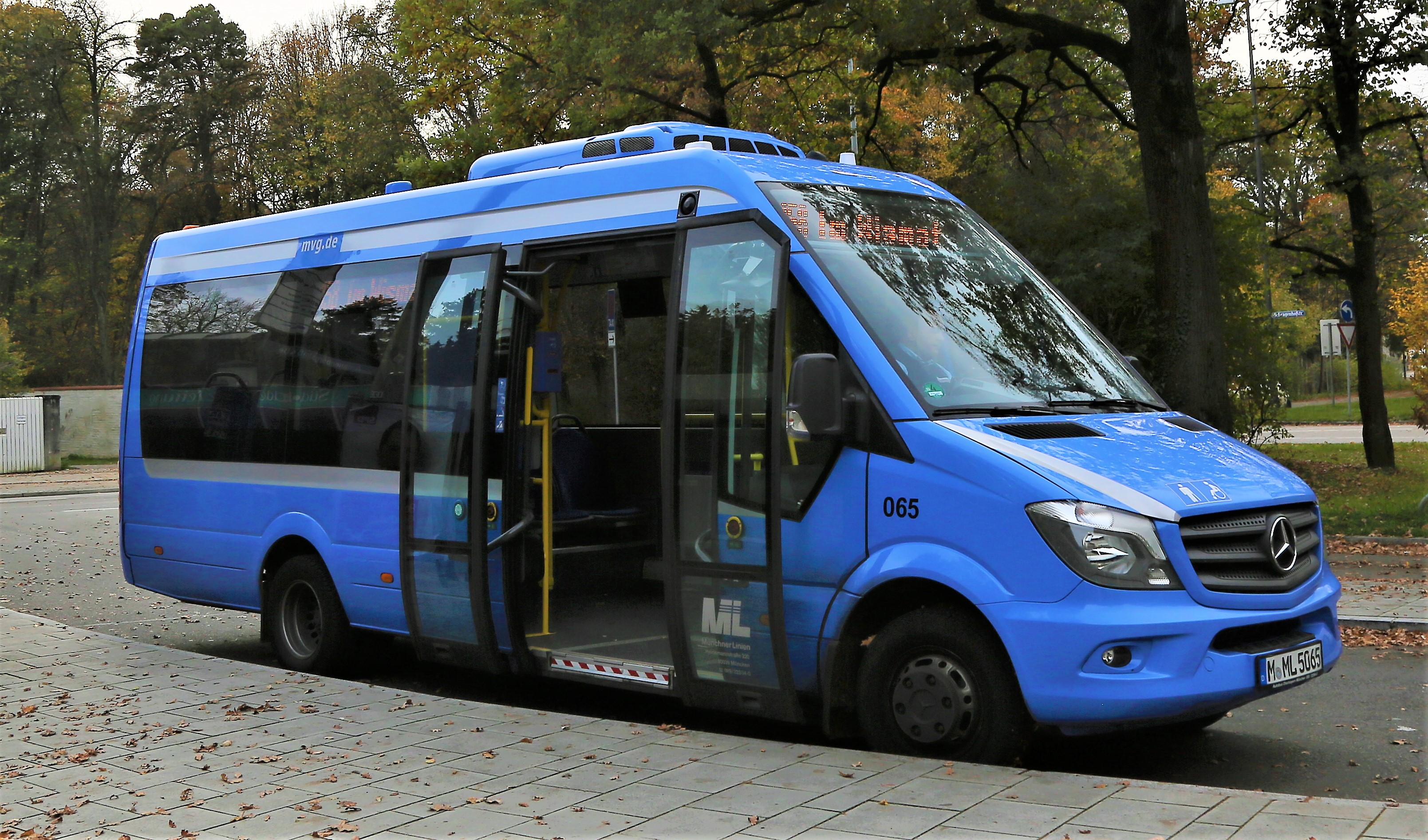 Ein Bus der Kleinbuslinie 158 steht an der Haltestelle Amalienburgstraße in München